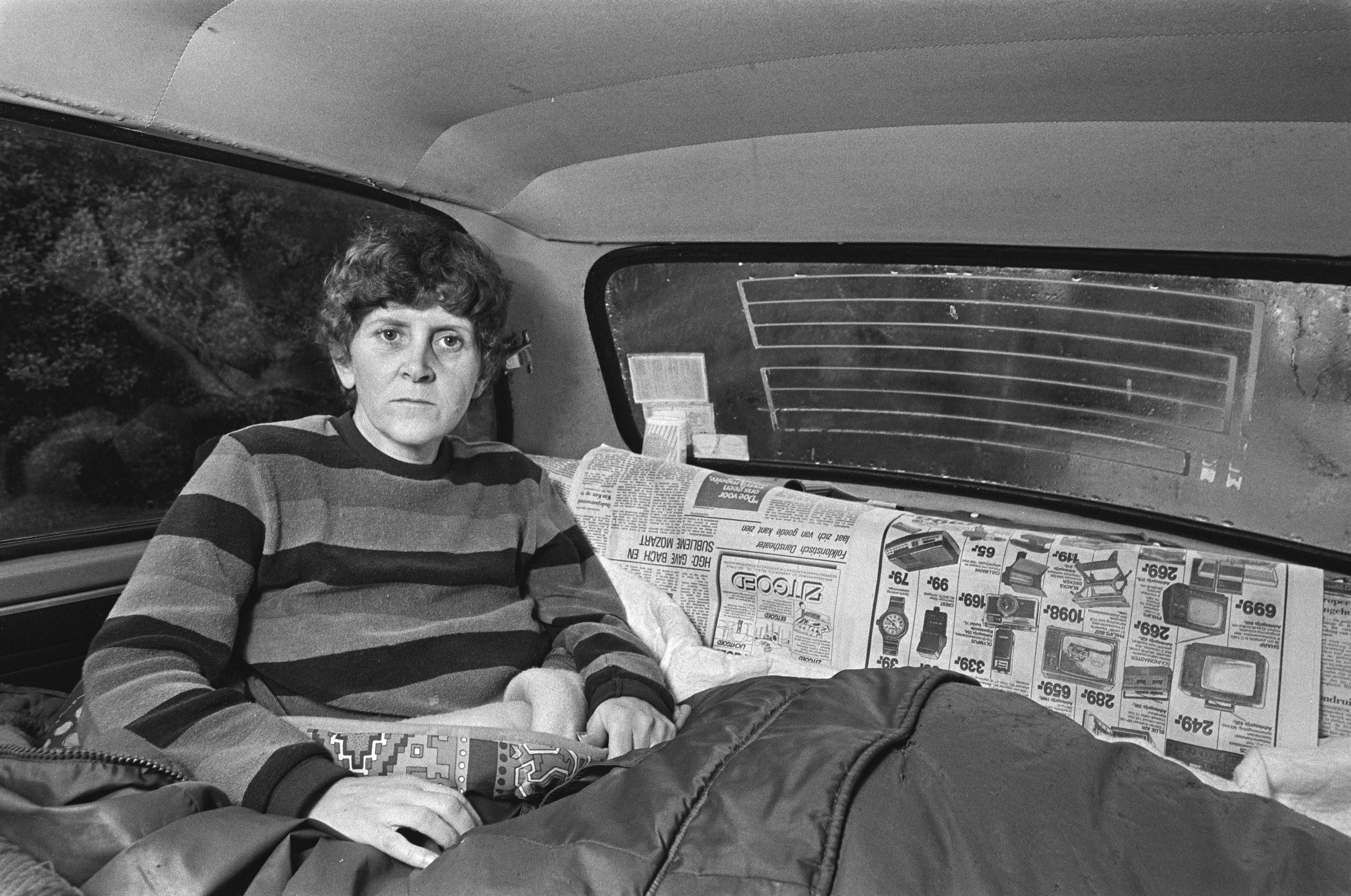 Collectie / Archief : Fotocollectie Anefo Reportage / Serie : [ onbekend ] Beschrijving : 38-Jarige Willy van den Heuvel woont al 3 jaar in Mini Ede, uit protest dat zij niet de woning kreeg die zij wil Datum : 5 januari 1982 Locatie : Ede Trefwoorden : Autos Persoonsnaam : Heuvel, Willy van den Fotograaf : Antonisse, Marcel / Anefo Auteursrechthebbende : Nationaal Archief Materiaalsoort : Negatief (zwart/wit) Nummer archiefinventaris : bekijk toegang 2.24.01.05 Bestanddeelnummer : 931-8945